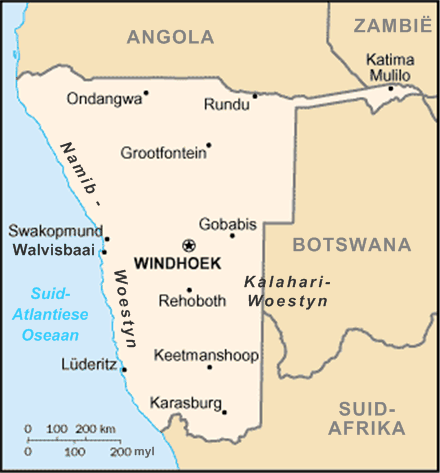 Geskep deur gebruiker:Laurens gegrond op Engelse CIA weergawe. Hiermee vrygestel onder GFDL.